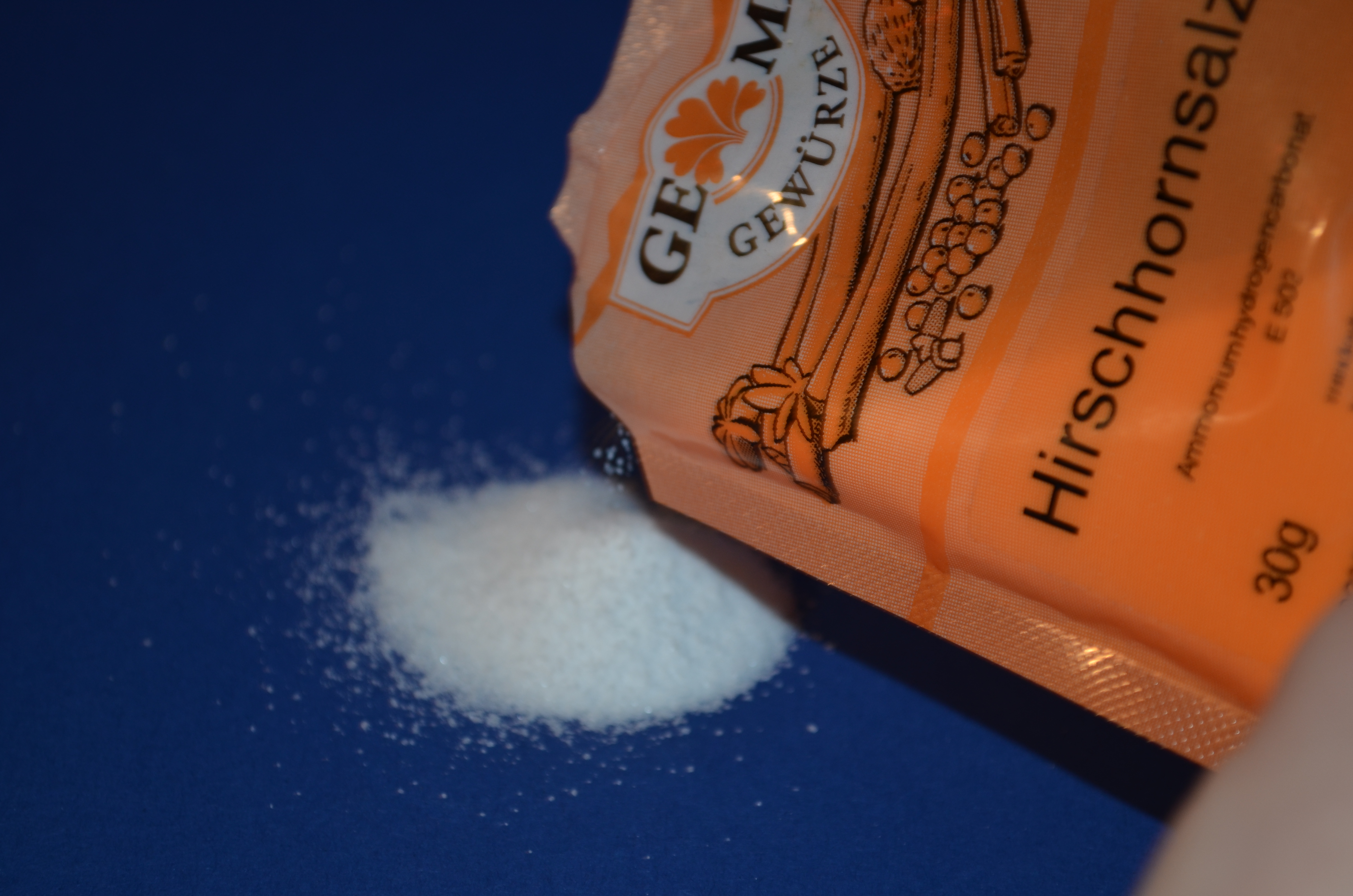 Hirschhornsalz (Pulver)